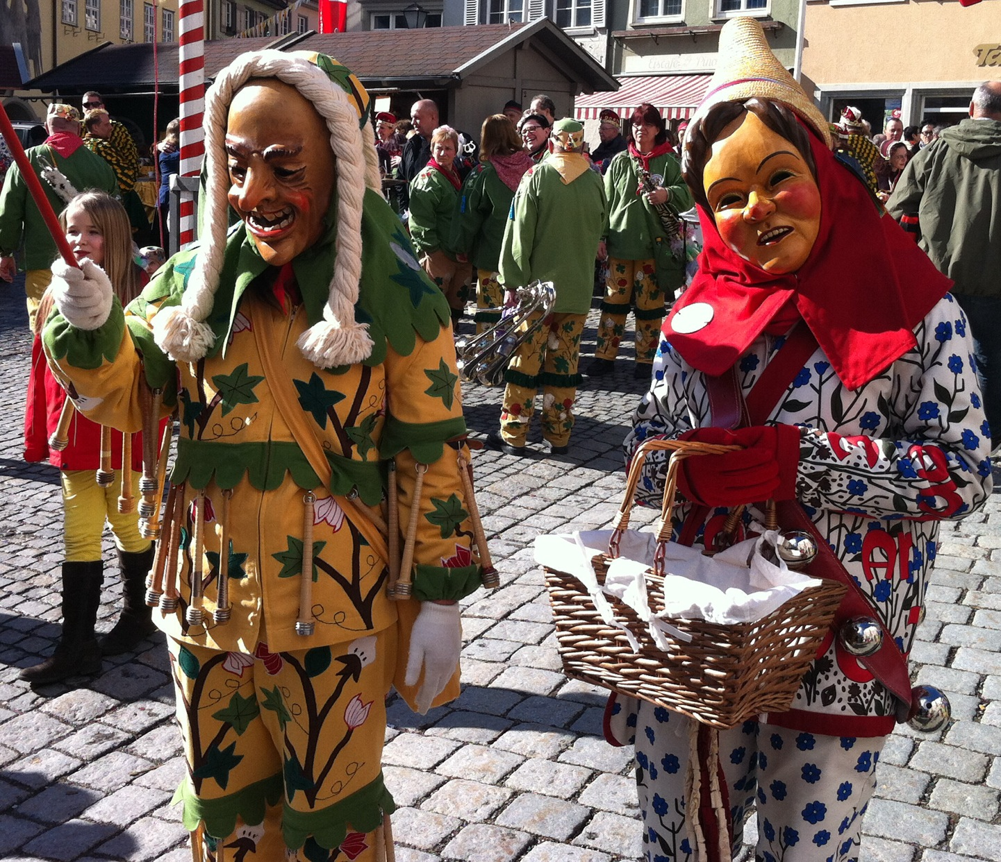 Spindelnarr und Aneweible der Wangemer Narrenzunft Kuhschelle. Fotografiert beim Wangemer Wein am 28. Februar 2014